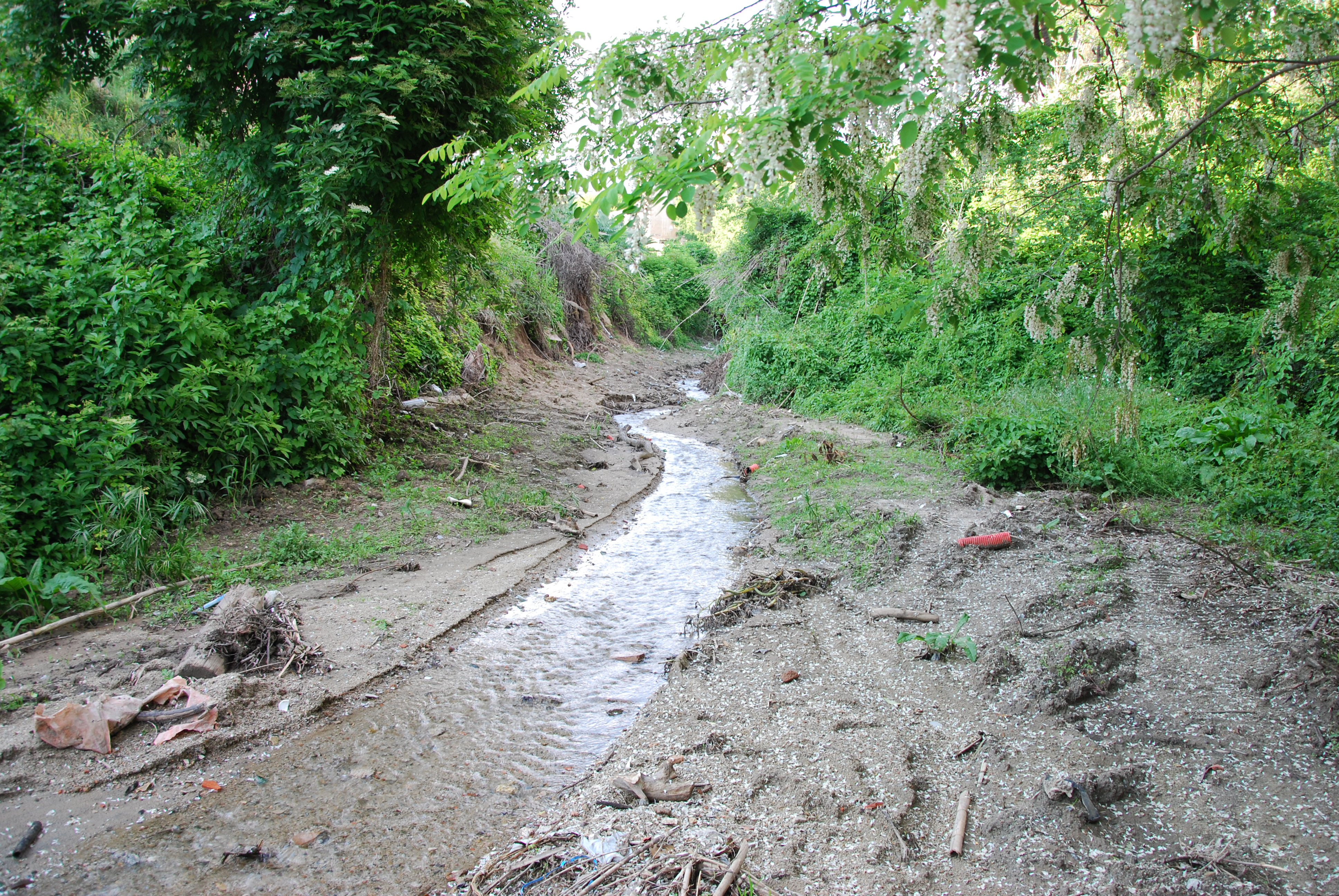 La riera de Canyet de Badalona